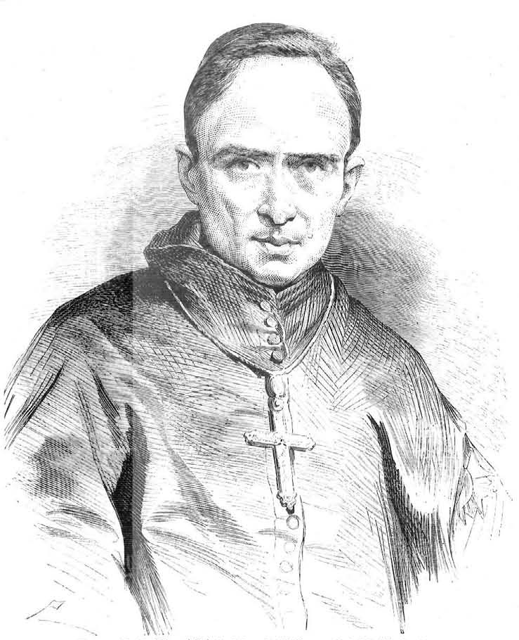 Miguel Salvá según grabado aparecido en La Ilustración Española y Americana, año XVII, n.º XLV, 1 de diciembre de 1873